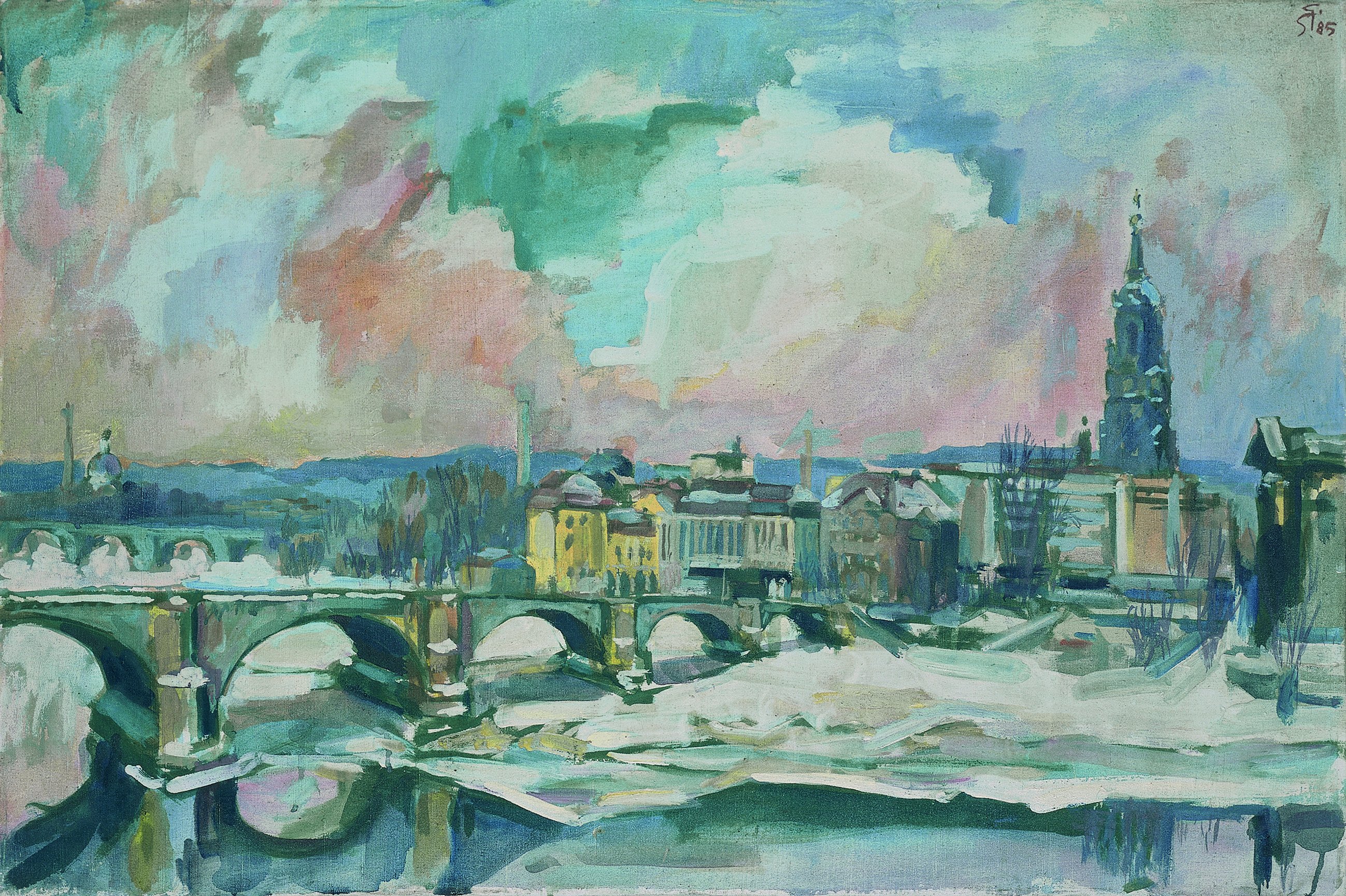 Dresdner-Neustadt, 103 x 69, 1985